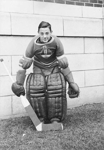 Jacques Plante, 1944 - 1945 / Shawinigan Falls, Quebec. Sur la photo, il porte le chandail de l'équipe de hockey de l'école supérieure Immaculée-Conception (ÉSIC), de Shawinigan.